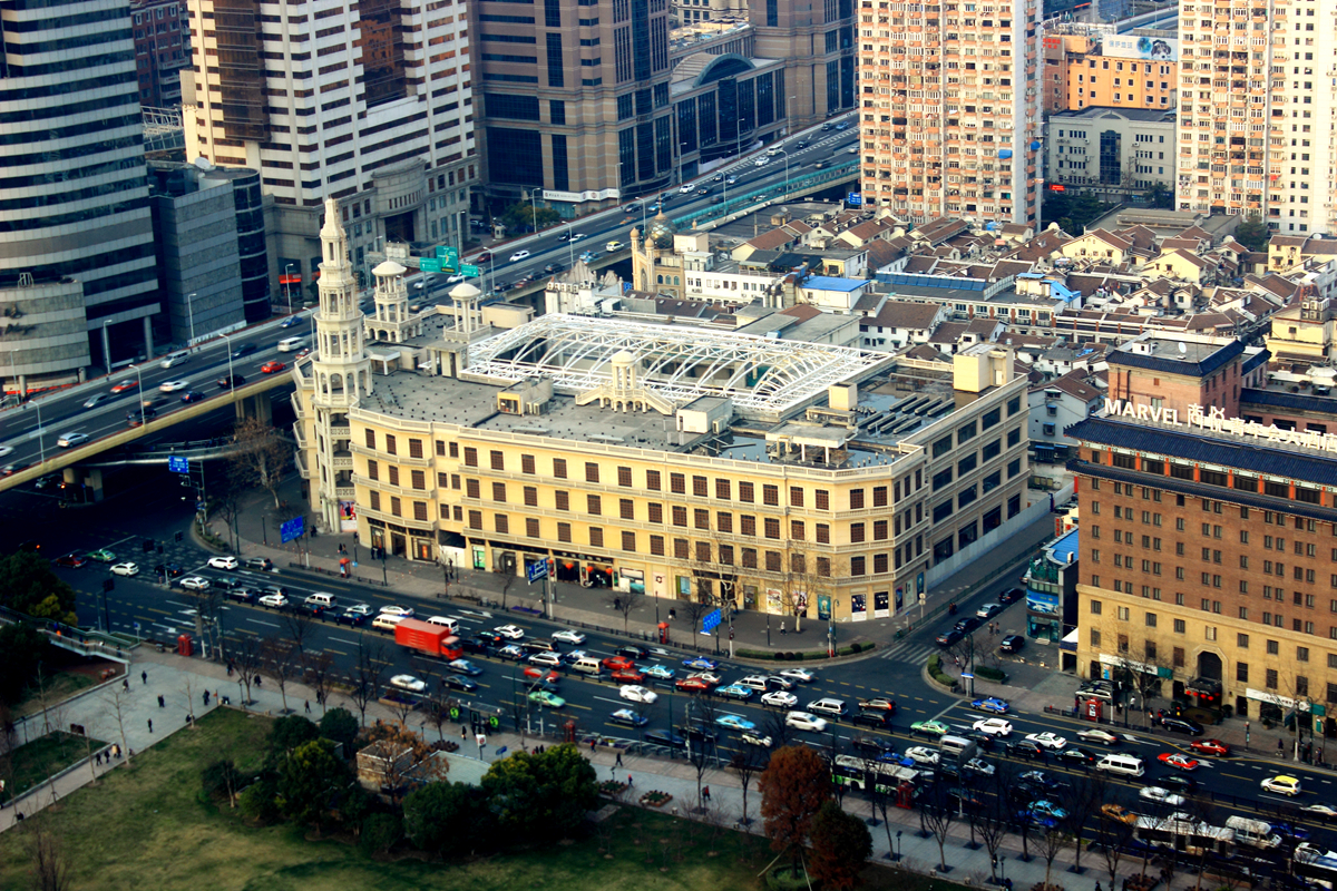 大世界俯拍图